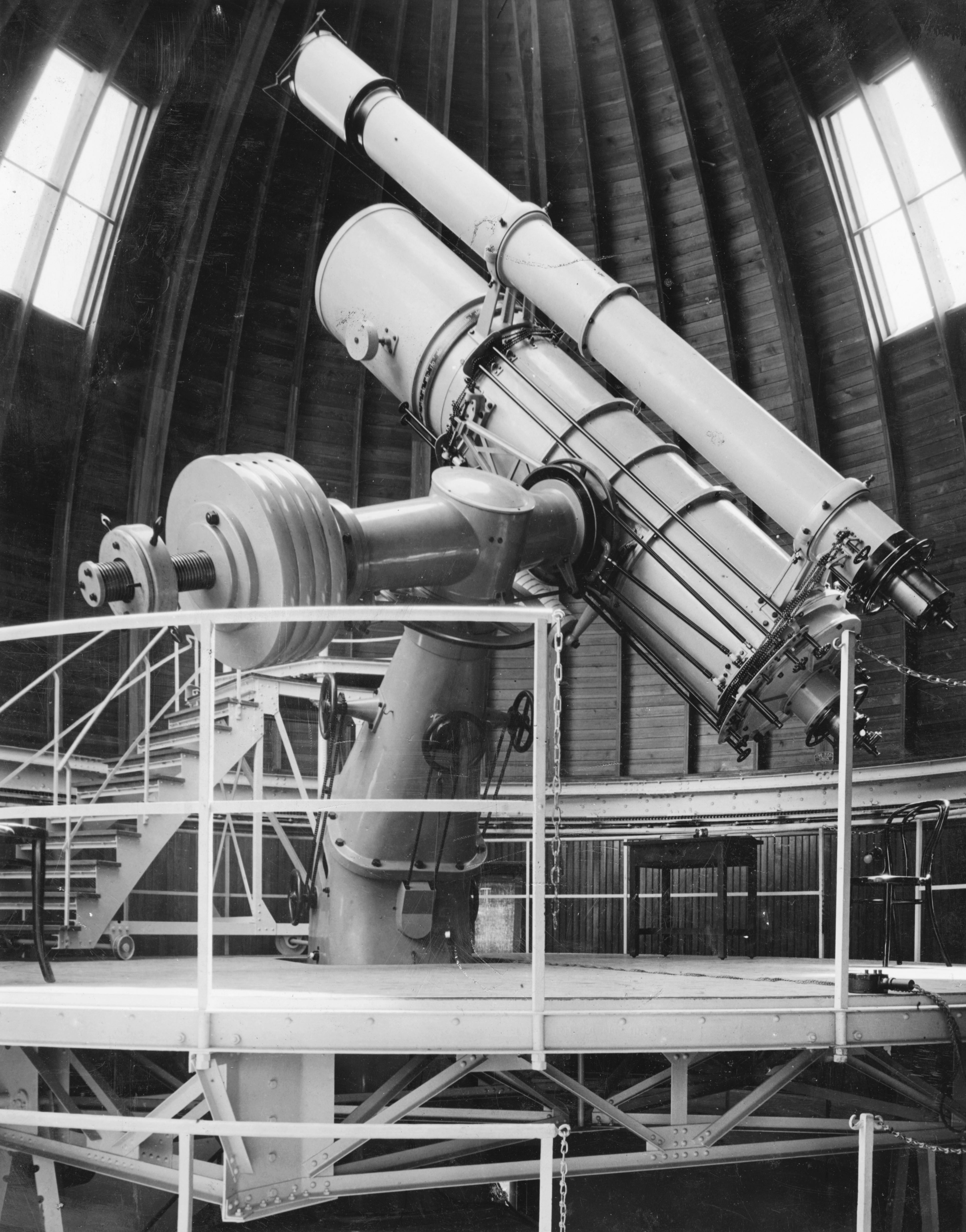 MTA Konkoly Thege Miklós Csillagászati Intézet, 60 cm-es teleszkóp. Location: Hungary, Budapest Tags: observatory, public building, Hungarian Academy of Sciences, Zeiss-Heyde-brand, Schmidt-telescope Title: MTA Konkoly Thege Miklós Csillagászati Intézet, 60 cm-es teleszkóp.